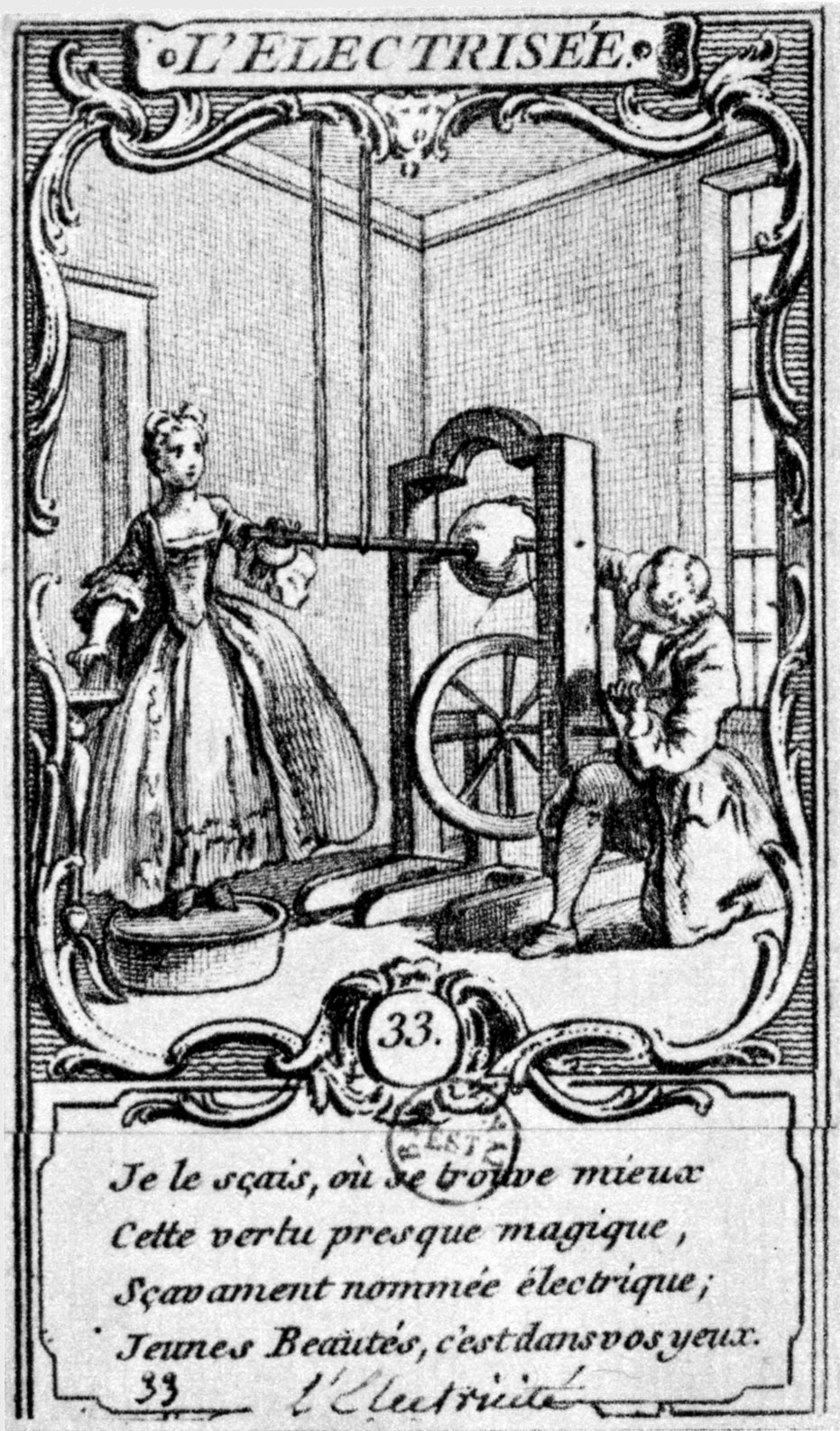 Hubert-François Gravelot: Die Elektrisierte, um 1750. Public Domain